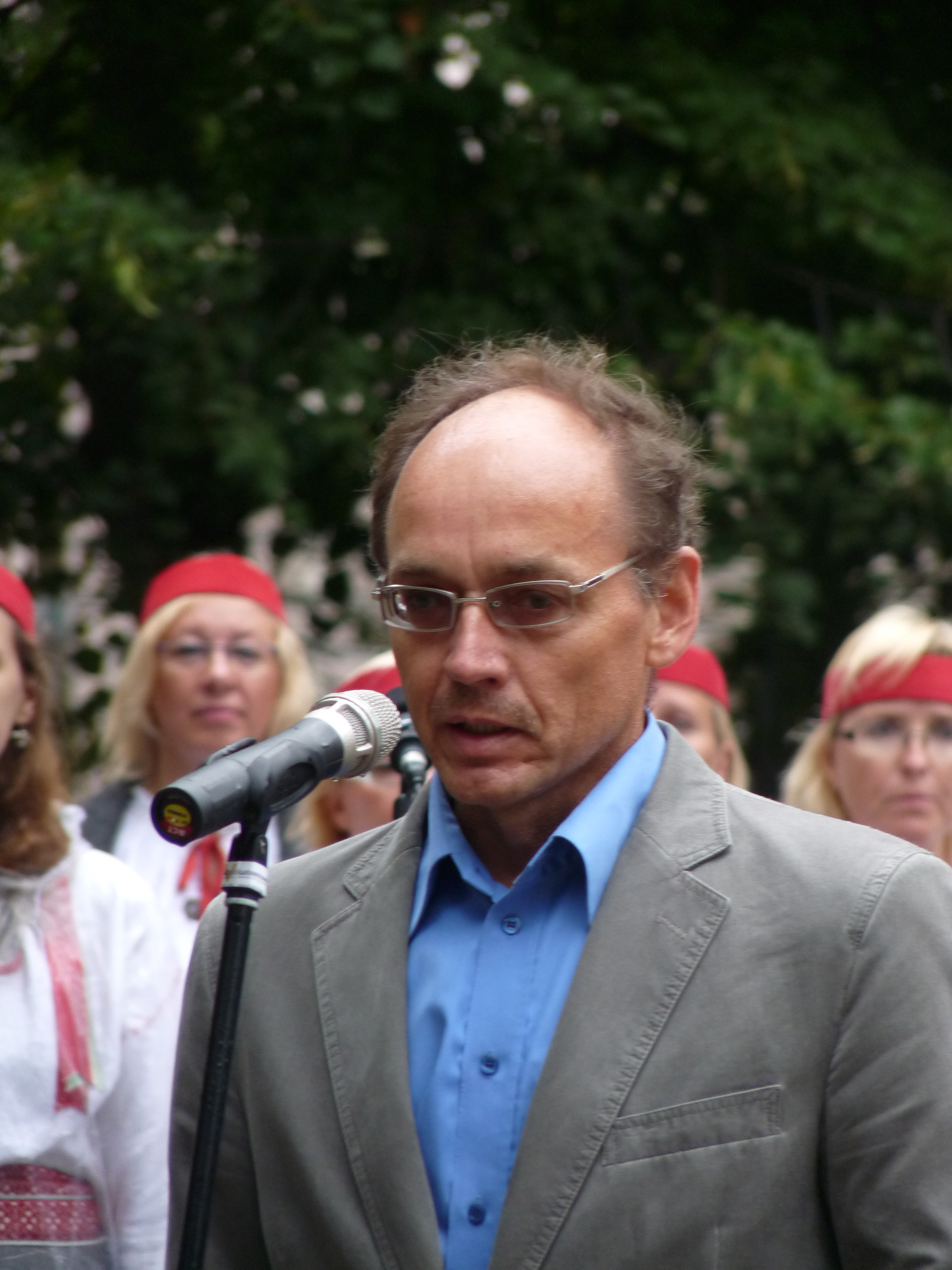 Ajaloolane Eero Medijainen esinemas Eesti taasiseseisvumispäeva tähistamisel Tartu vabadussamba juures, 20. august 2012